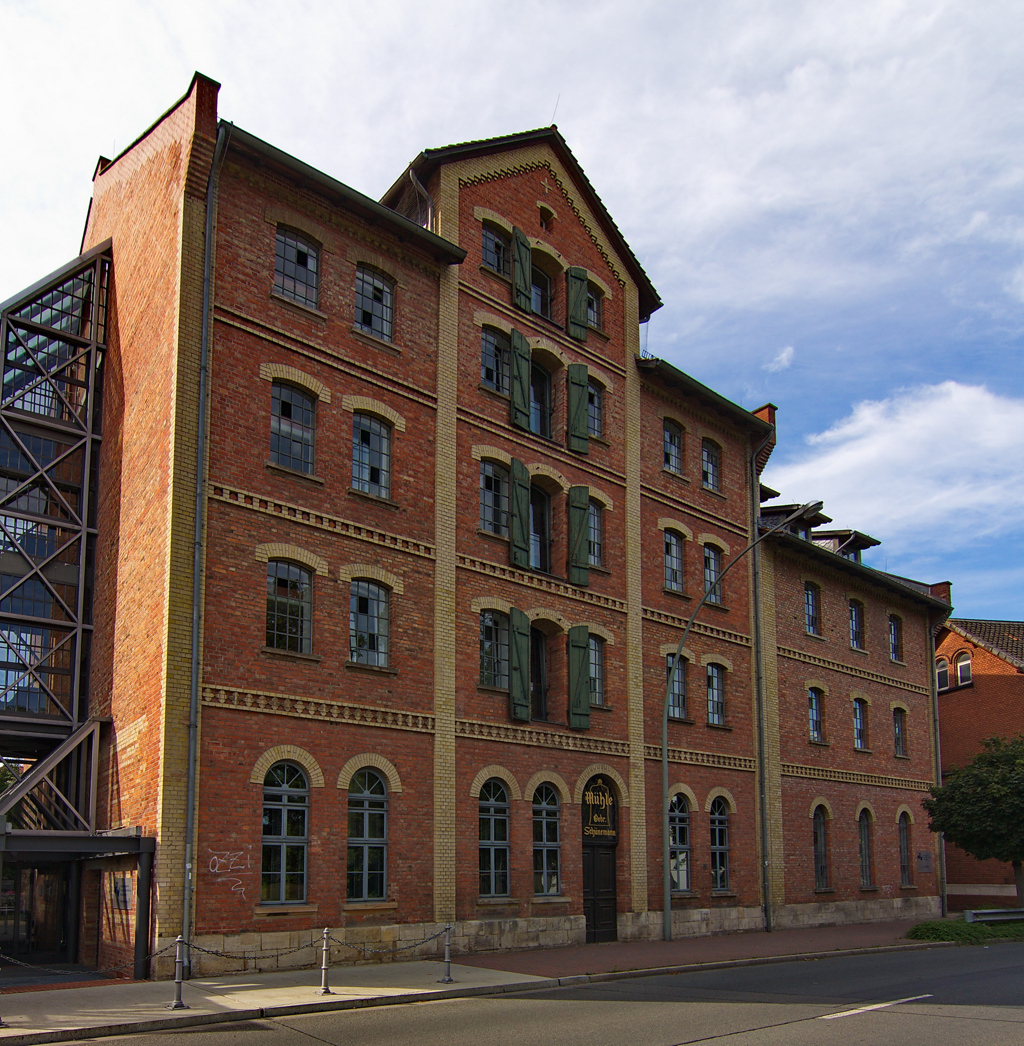 Schünemanns Wassermühle von 1630 in Wolfenbüttel war bis 1979 in Betrieb, seitdem nutzt das aufwendig restaurierte Gebäude die "Bundesanstalt für kulturelle Bildung".